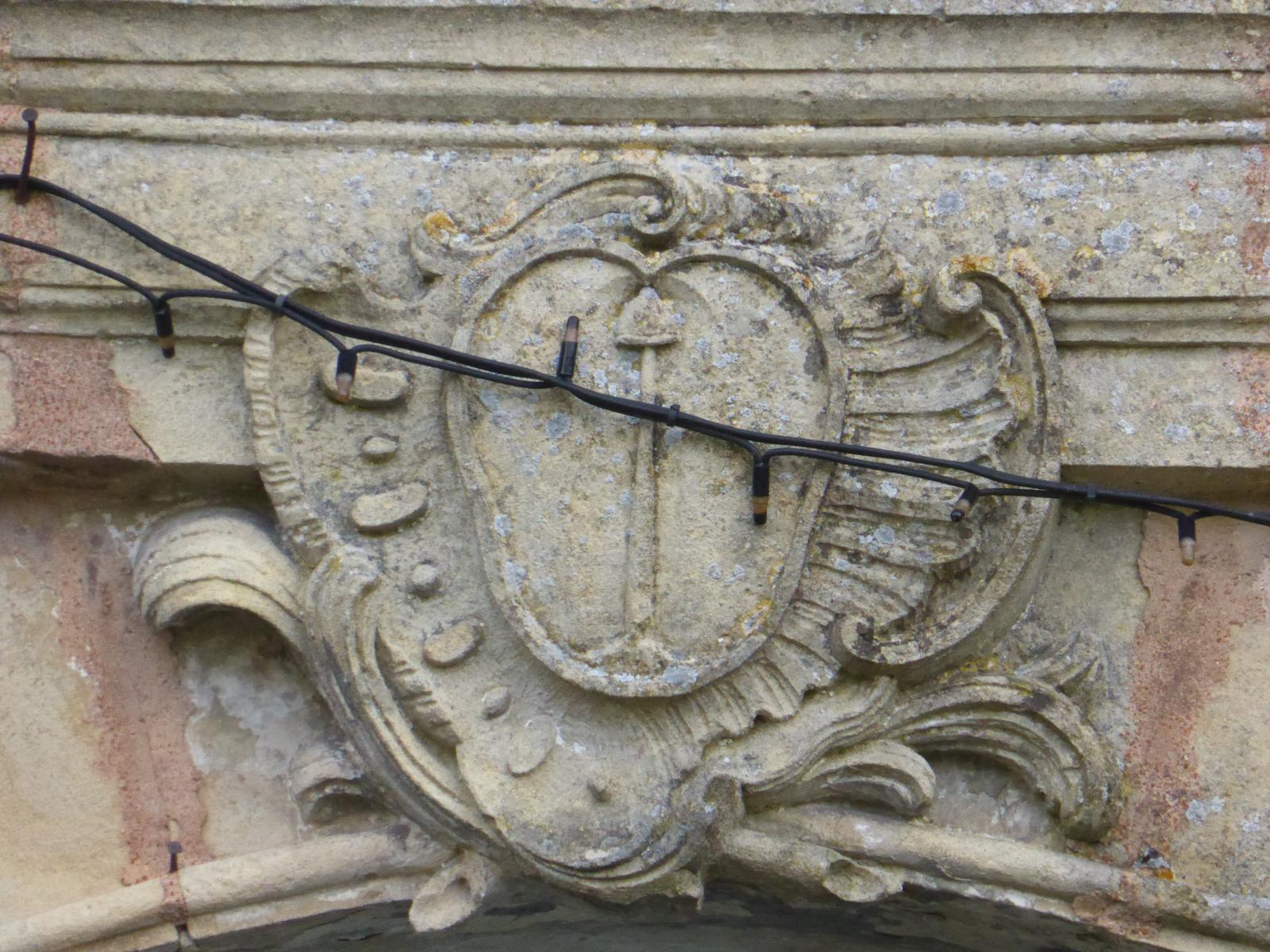 Cartouche présent au droit de l'entrée de l'église communale de Nicey-sur-Aire